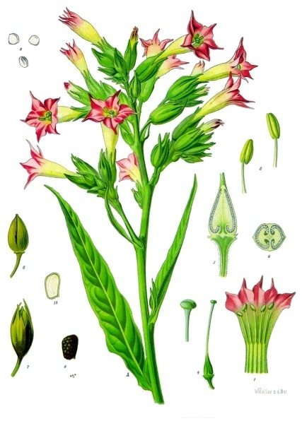 Virginische Tabak. A blühender Stengel in natürl. Grösse; 1 auseinandergebreitete Krone, desgl.; 2 Staubgefäss vergrössert; 3 Pollenkörner, desgl.; 4 Fruchtknoten mit Griffel und Narbe, desgl.; 5 Fruchtknoten im Längsschnitt, desgl.; 6 derselbe im Querschnitt; 7 Frucht mit Fruchtkelch, natürl. Grösse; 8 dieselbe ohne Kelch, desgl.; 9 Same, vergrössert; 10 derselbe zerschnitten, desgl.